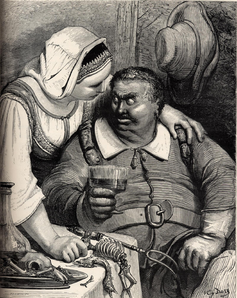 Illustration for Charles Perrault's Le Petit Poucet from Histoires ou Contes du Temps passé: Les Contes de ma Mère l'Oye(1697). Gustave Doré's illustrations appear in an 1867 edition entitled Les Contes de Perrault. Eighth of eleven engravings